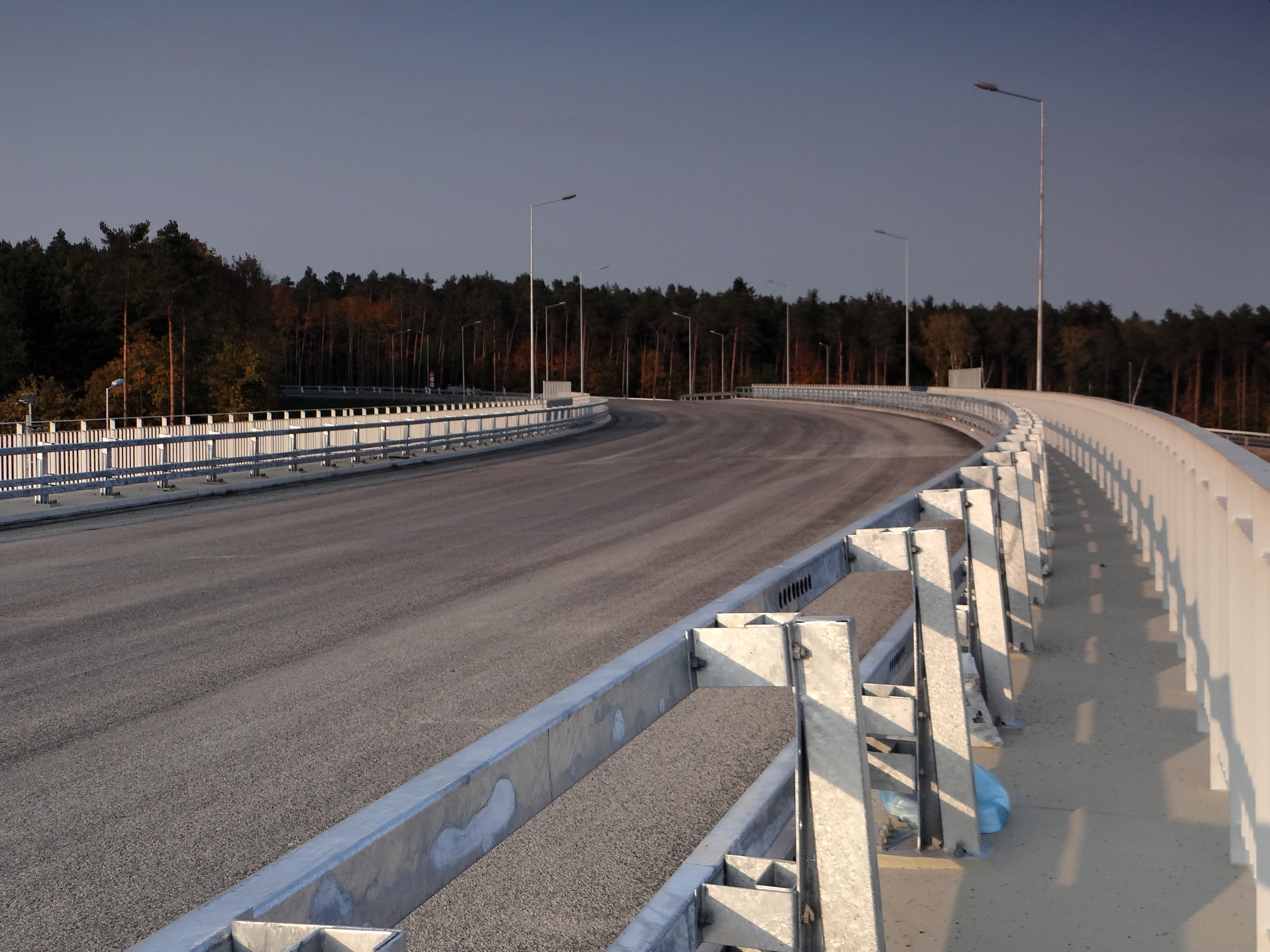 Rozestavěný obchvat okolo města Leżajsk, Polsko